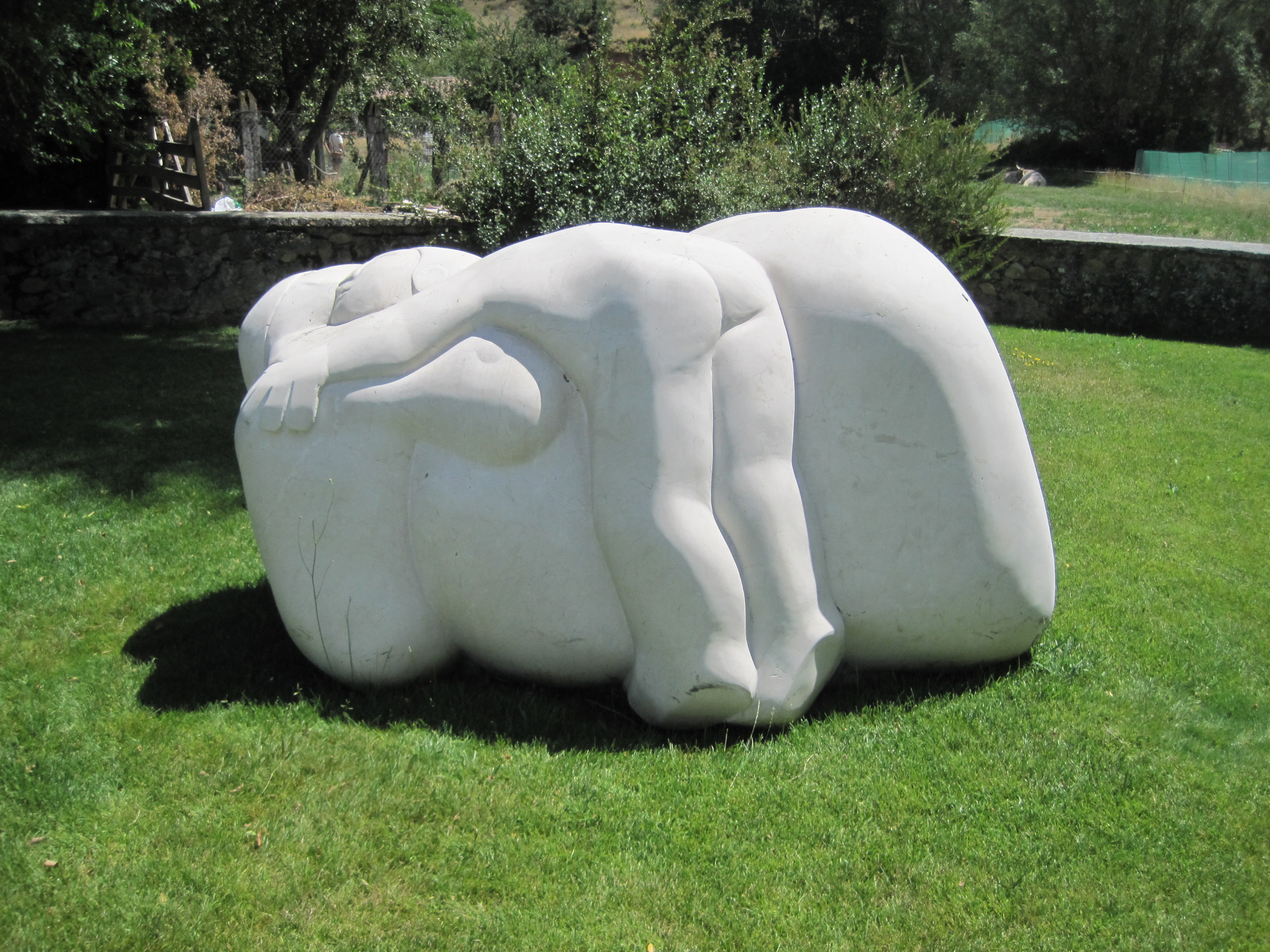 Escultura Maternidad (2009), de Castorina, en la sede de la Fundación Cerezales Antonino y Cinia (Cerezales del Condado, León, España).